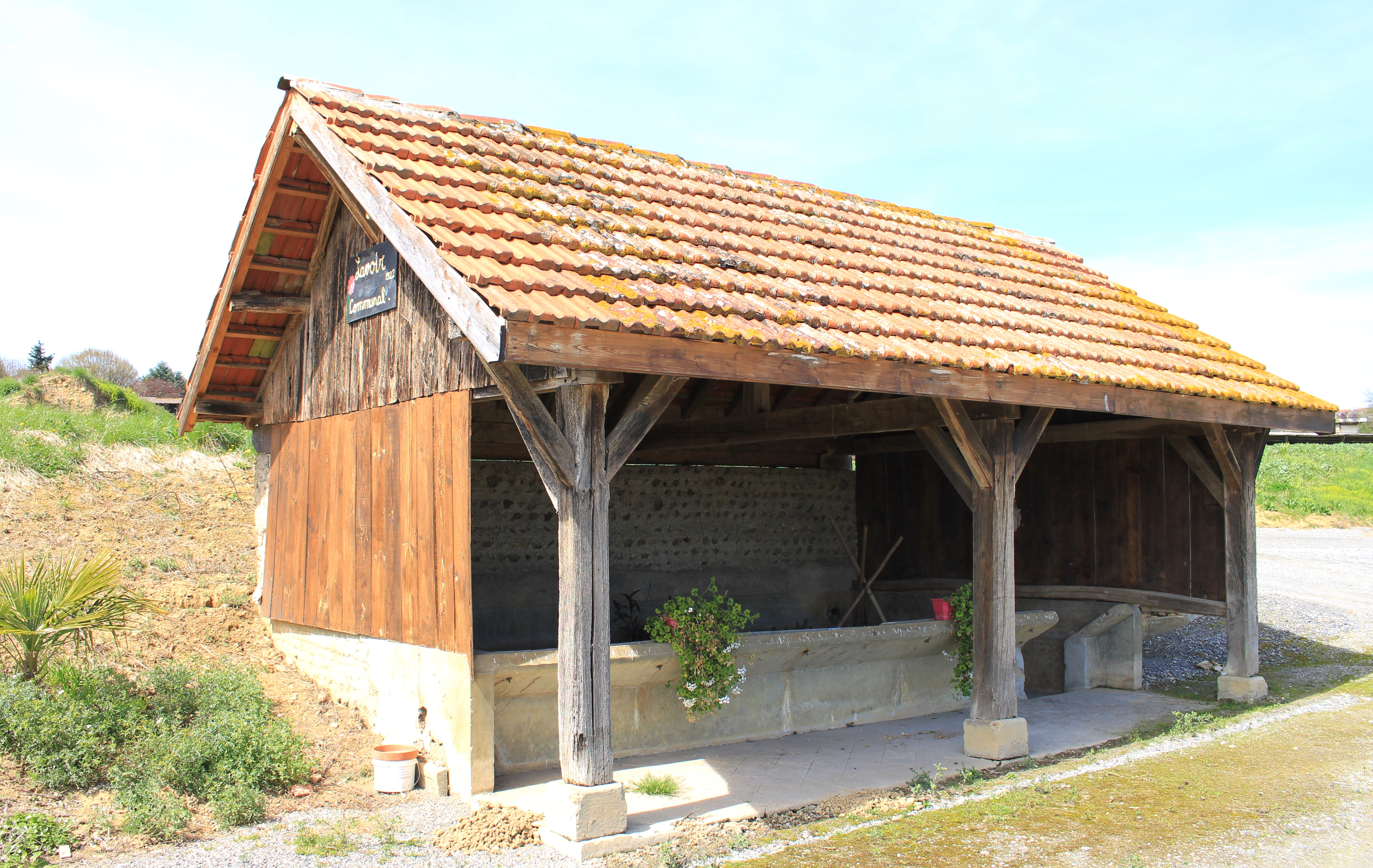 Lavoir de Sentous (Hautes-Pyrénées)